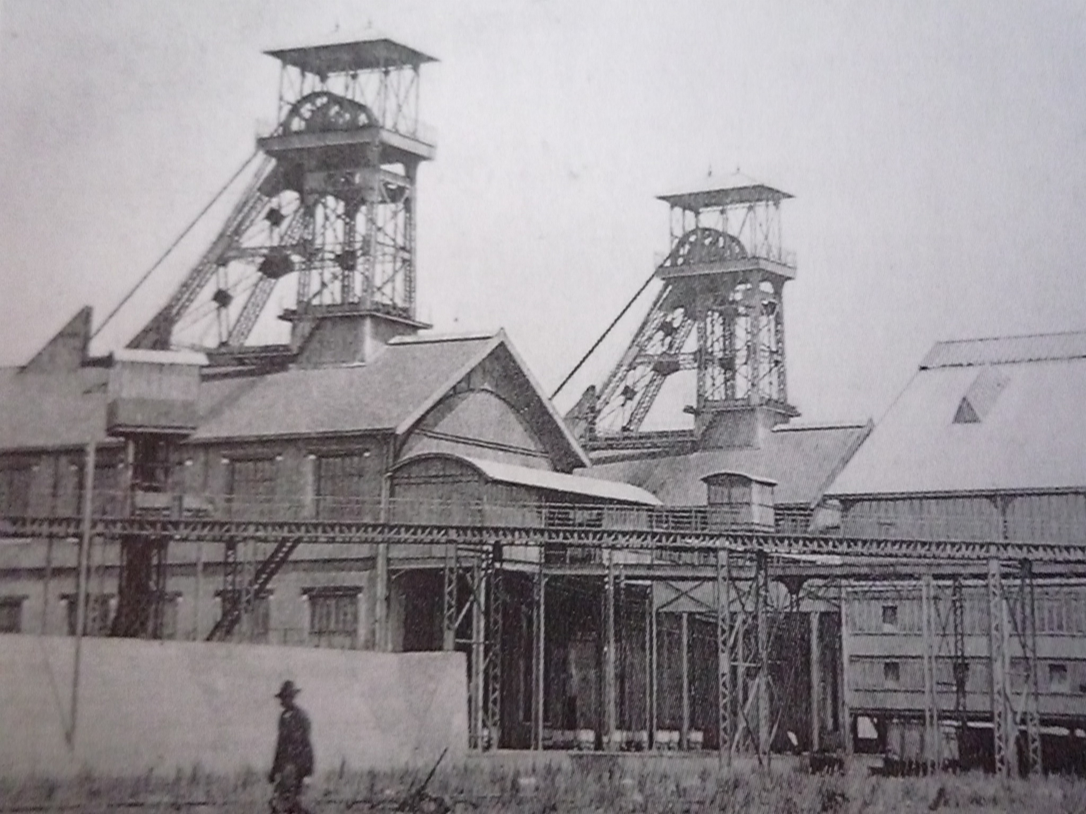 La Fosse n° 10 - 10 bis de la Compagnie des mines de Béthune était un charbonnage constitué de deux puits situé à Sains-en-Gohelle, Pas-de-Calais, Nord-Pas-de-Calais, France.